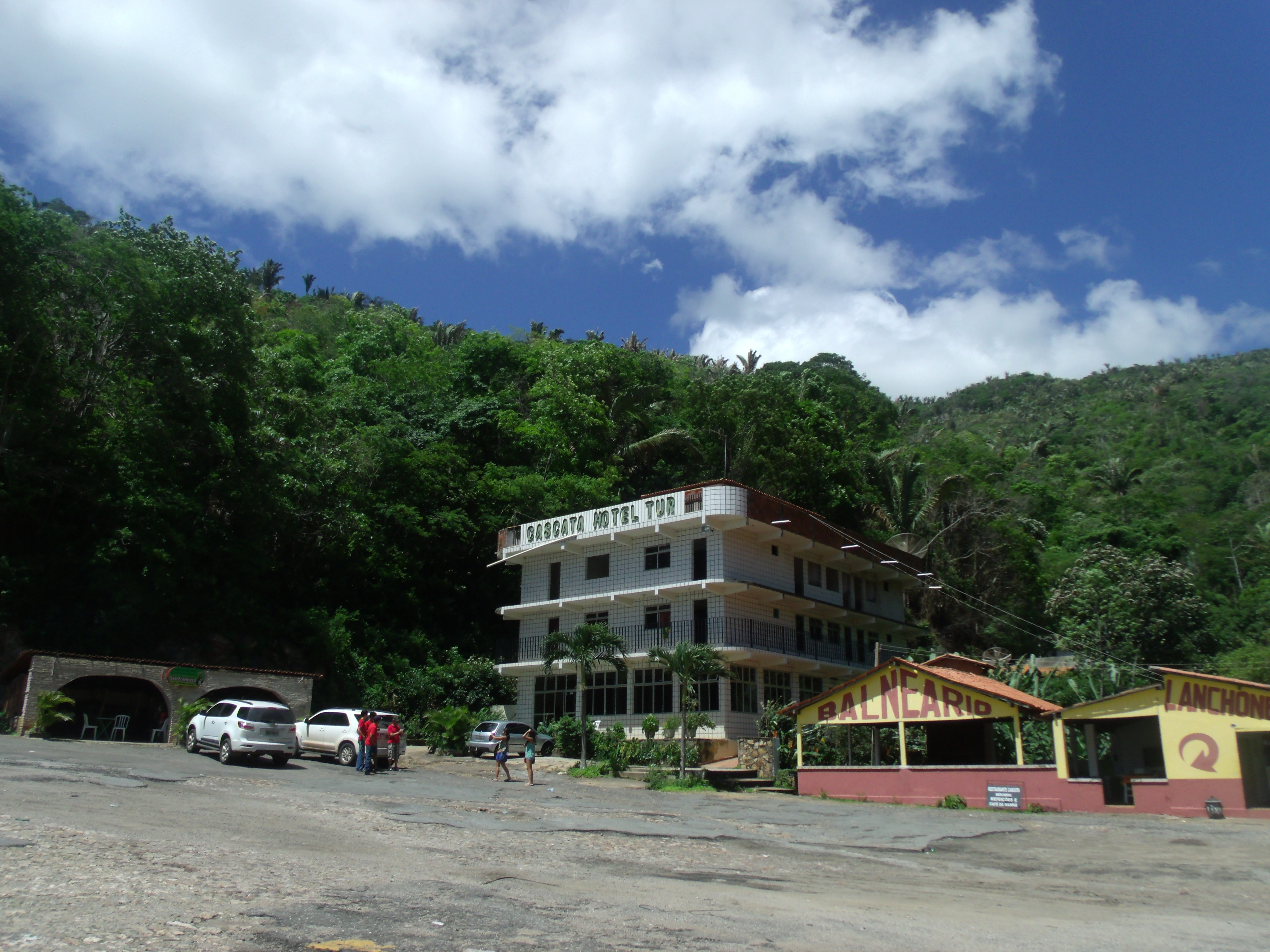 Vista do hotel cascata na serra grande, ou Serra da Ibiapaba, na rodovia BR-222, em Tianguá.